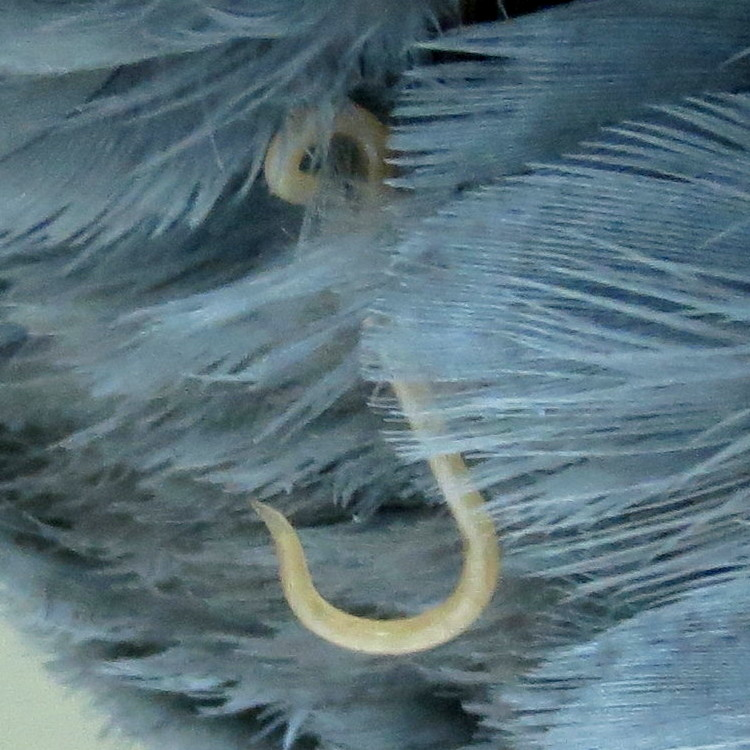 虫下しによる排泄後 羽毛に付着しているハト回虫。